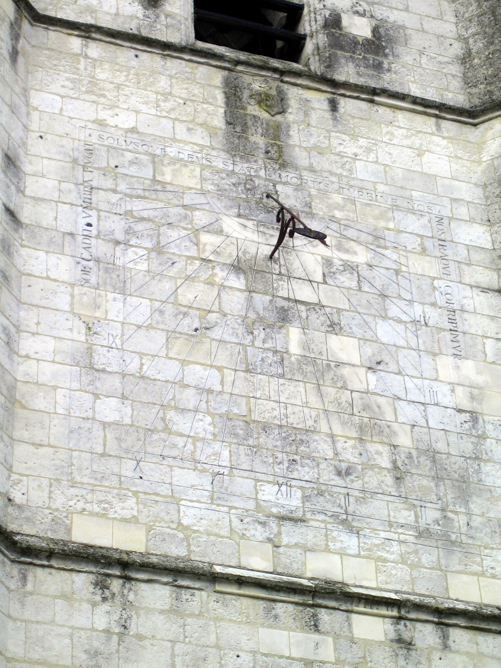 Quesnoy-sur-Airaines (Somme, France) - Cadran solaire de l'église. .